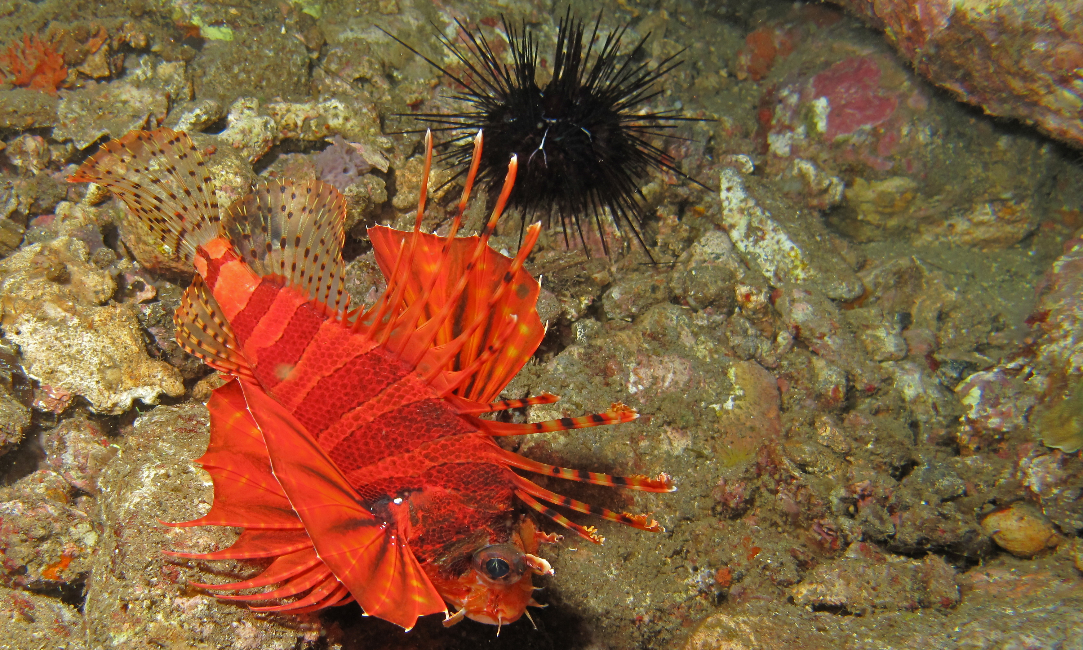 Nudi Falls, Lembeh Strait, Sulawesi, INDONESIA